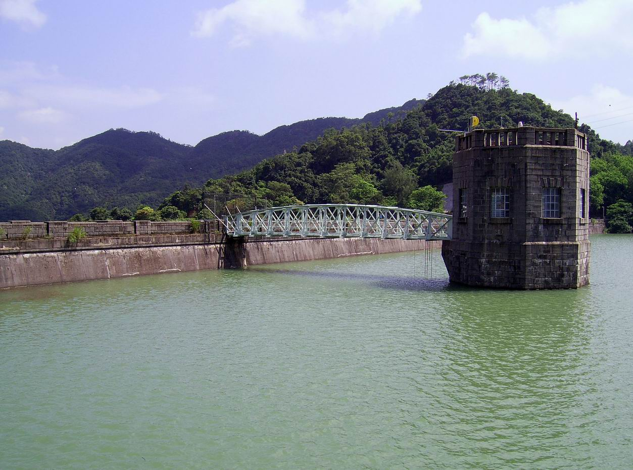 中文（香港）: 城門水塘水掣塔及鐵橋